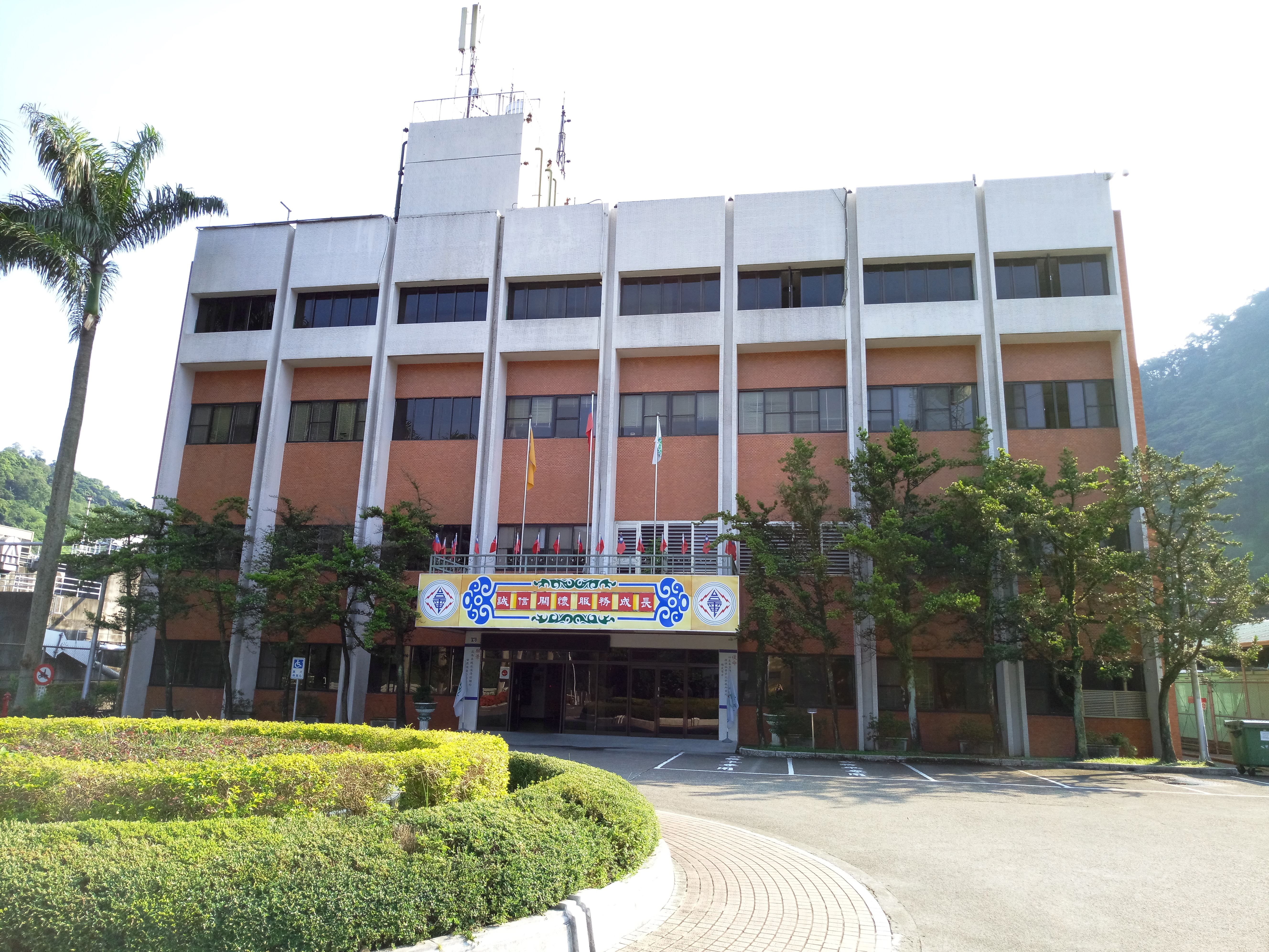 大觀發電廠行政中心與控制中心大樓